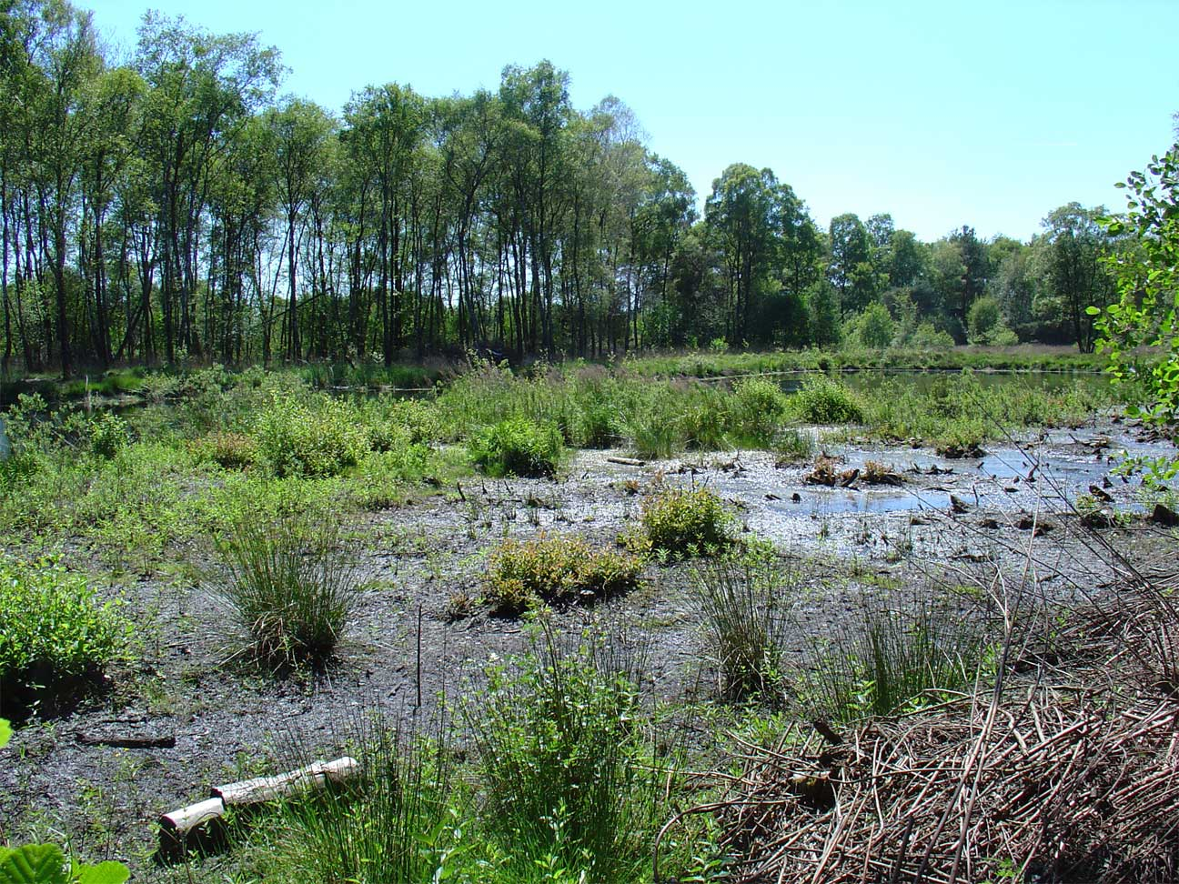 Naturschutzgebiet „Krosewicker Grenzwald“ in Vreden